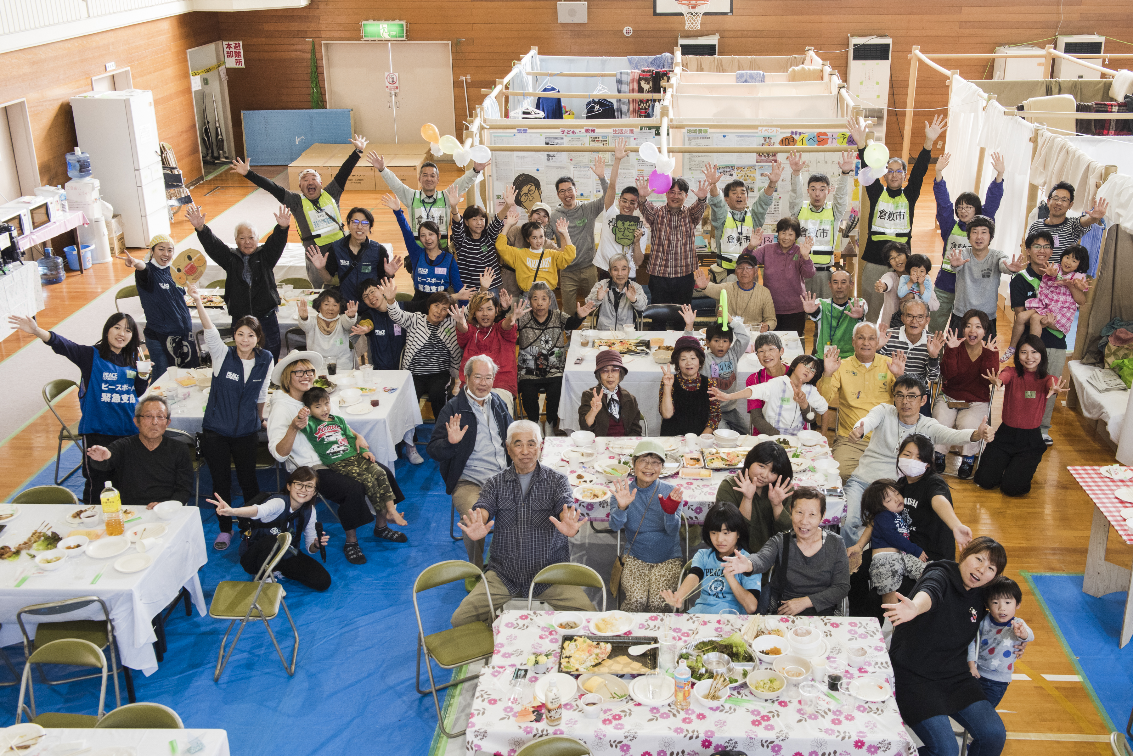 西日本豪雨での支援活動。